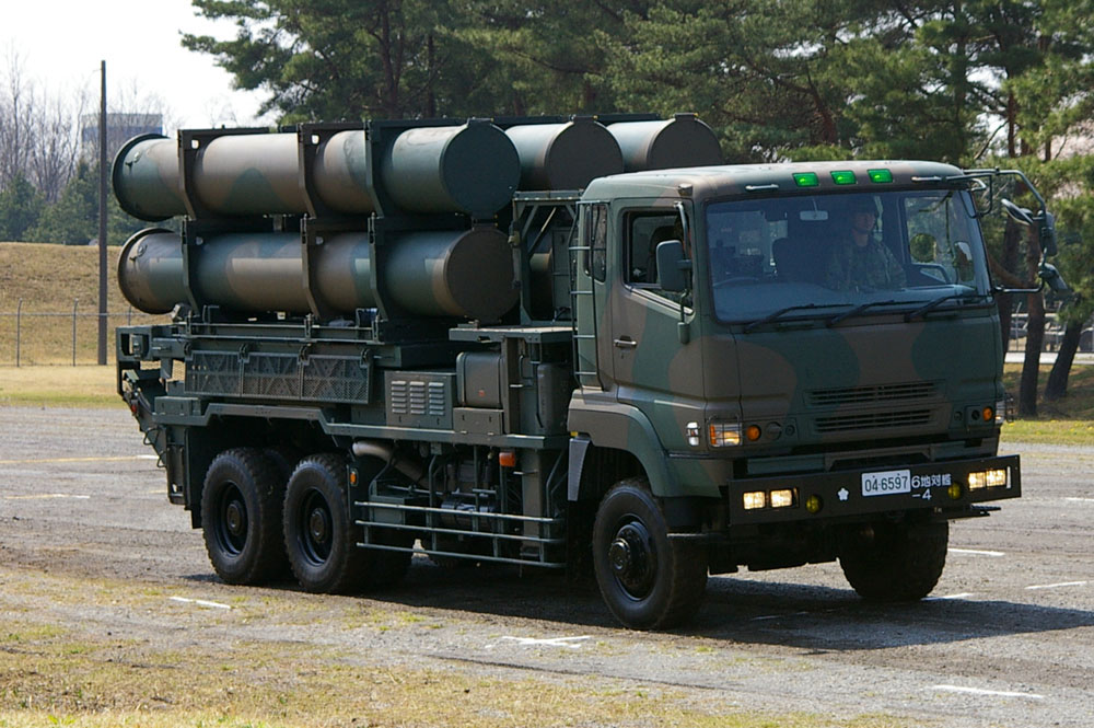 Taken by los688,8-Apr-2007,JGSDF Camp-Utsunomiya.JGSDF Type88 SSM.PD-self. ja:2007年4月8日、投稿者撮影。陸上自衛隊宇都宮駐屯地創立57周年記念行事。88式地対艦ミサイル、第6地対艦ミサイル連隊。